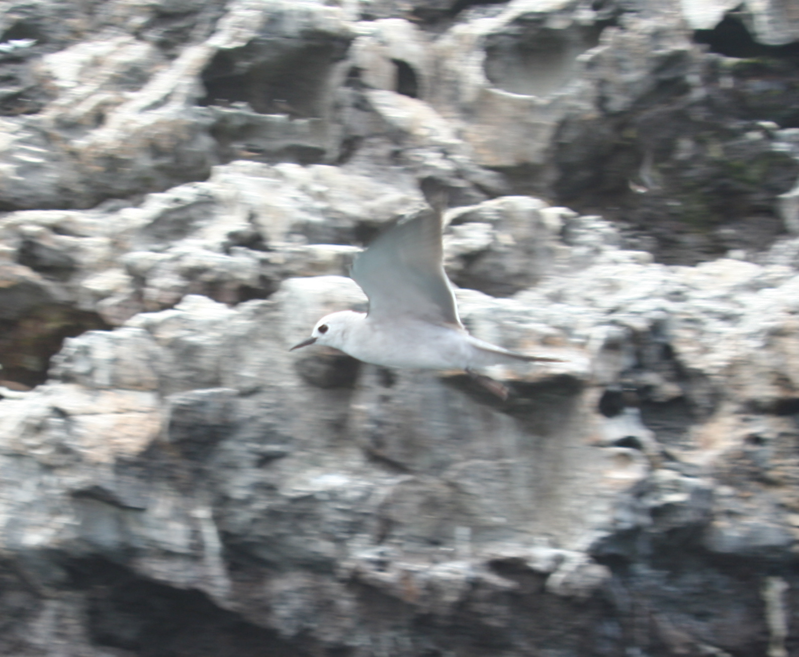 Blue Noddy Anous ceruleus at La Péruse Pinnacle, French Frigate Shoals, Hawaii